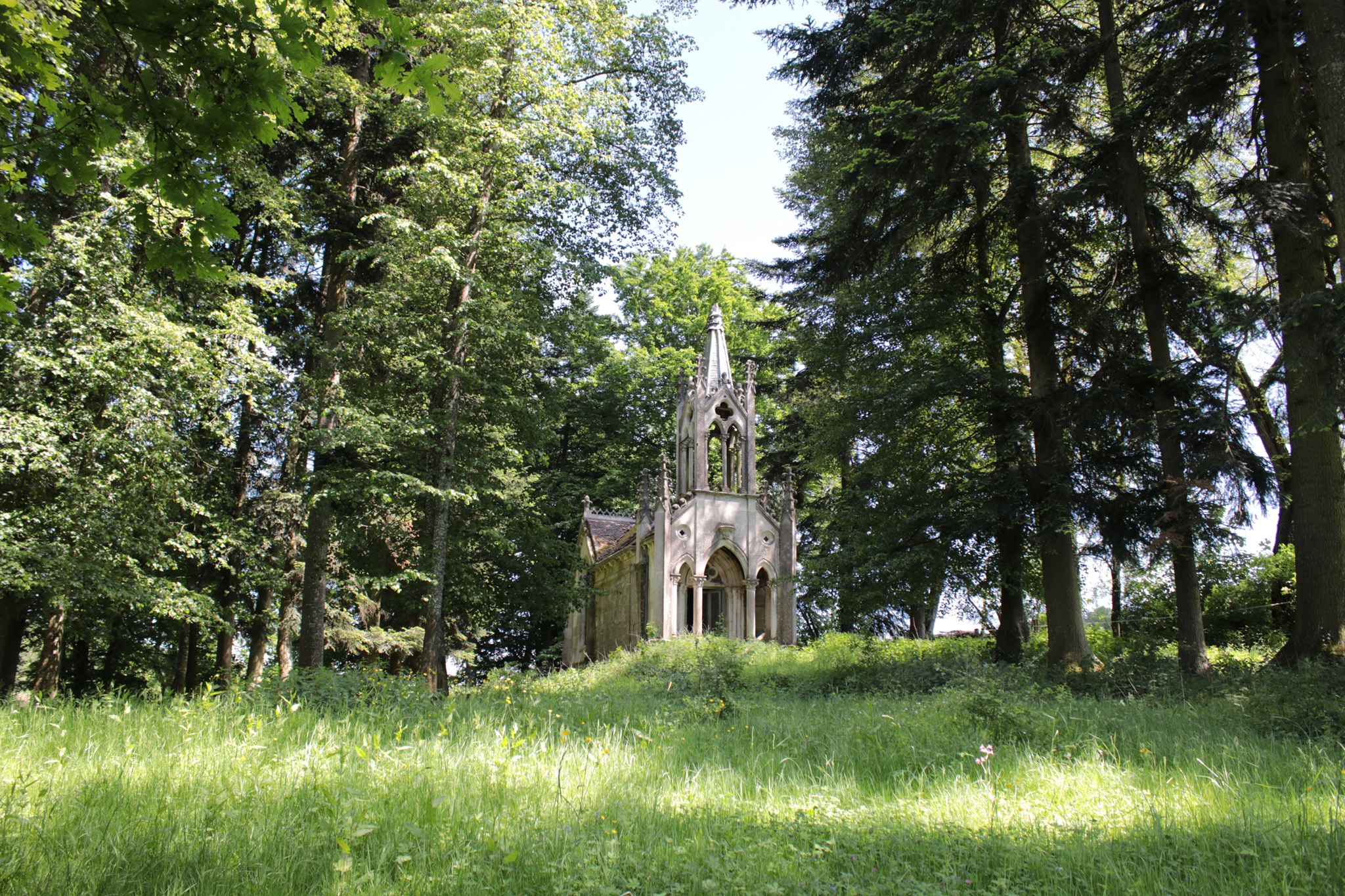 Kapel van het voormalige Cistercienzerklooster Beaulieu in de Franse gemeente Haute-Amance (52600)